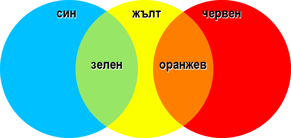 Цветове получени от жълтия цвят при смесване със син и червен.